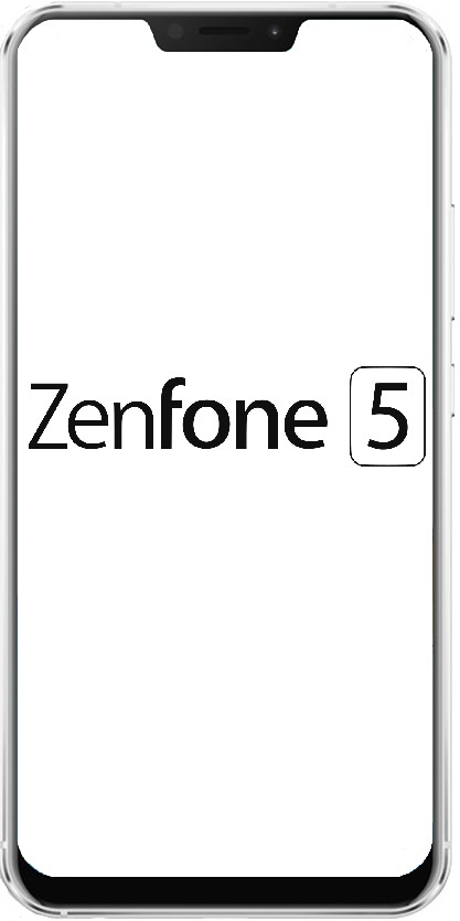 中文（台灣）: 華碩於2018年發布之型號